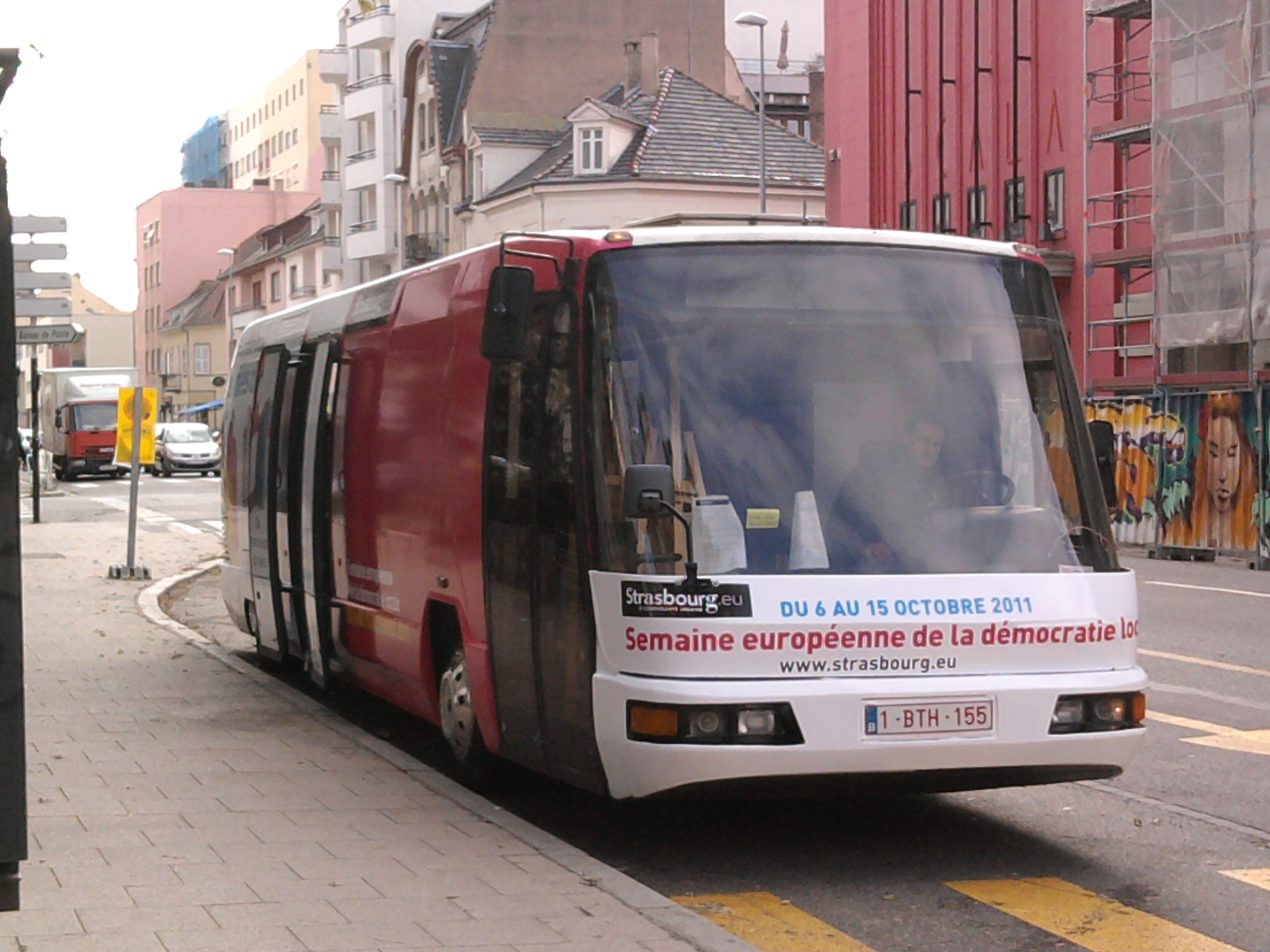 Bus utilisée par la municipalité de la ville de Strasbourg dans le cadre de la semaine européenne de la démocratie locale